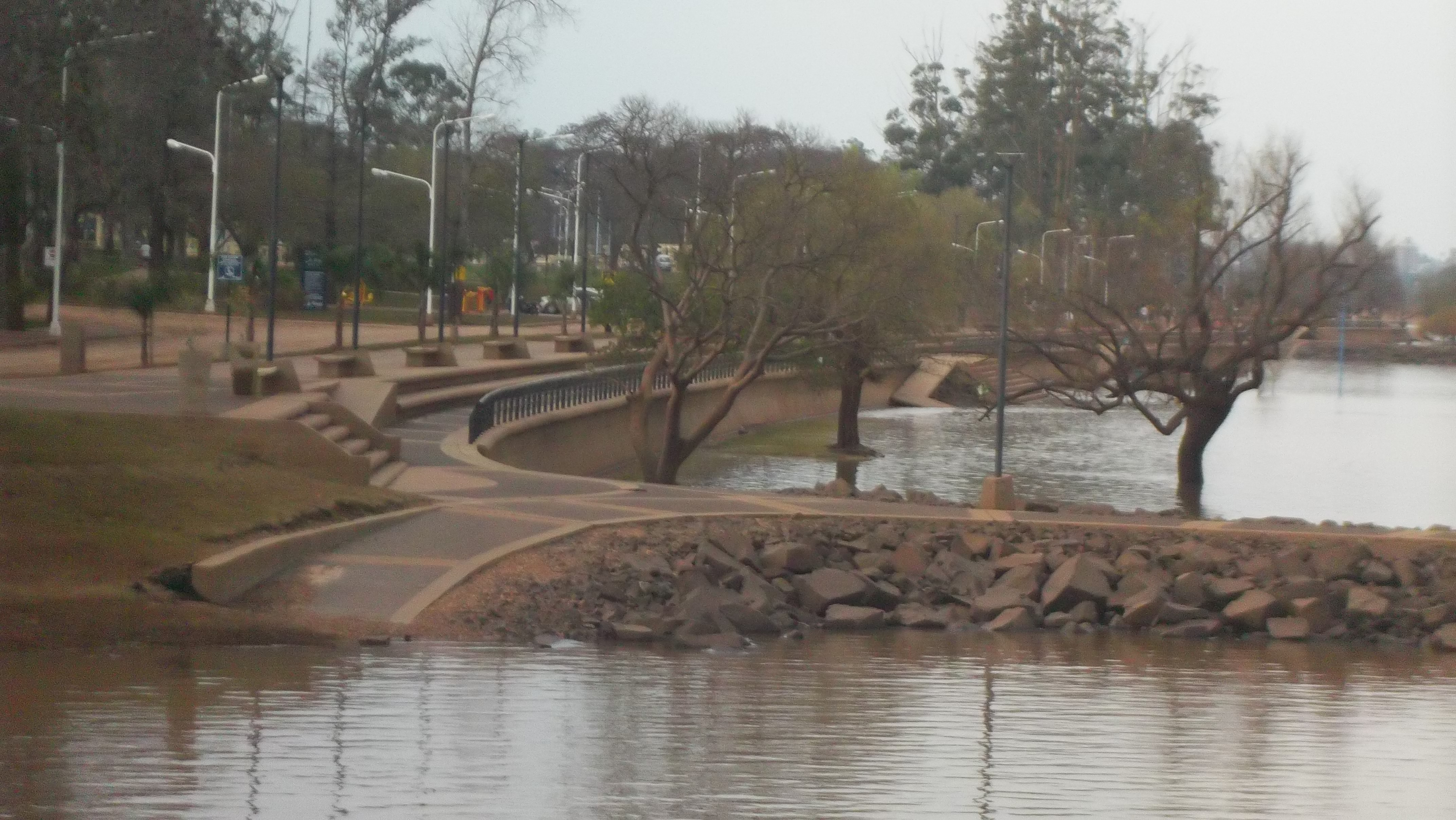 Paisaje de la costanera de Concordia